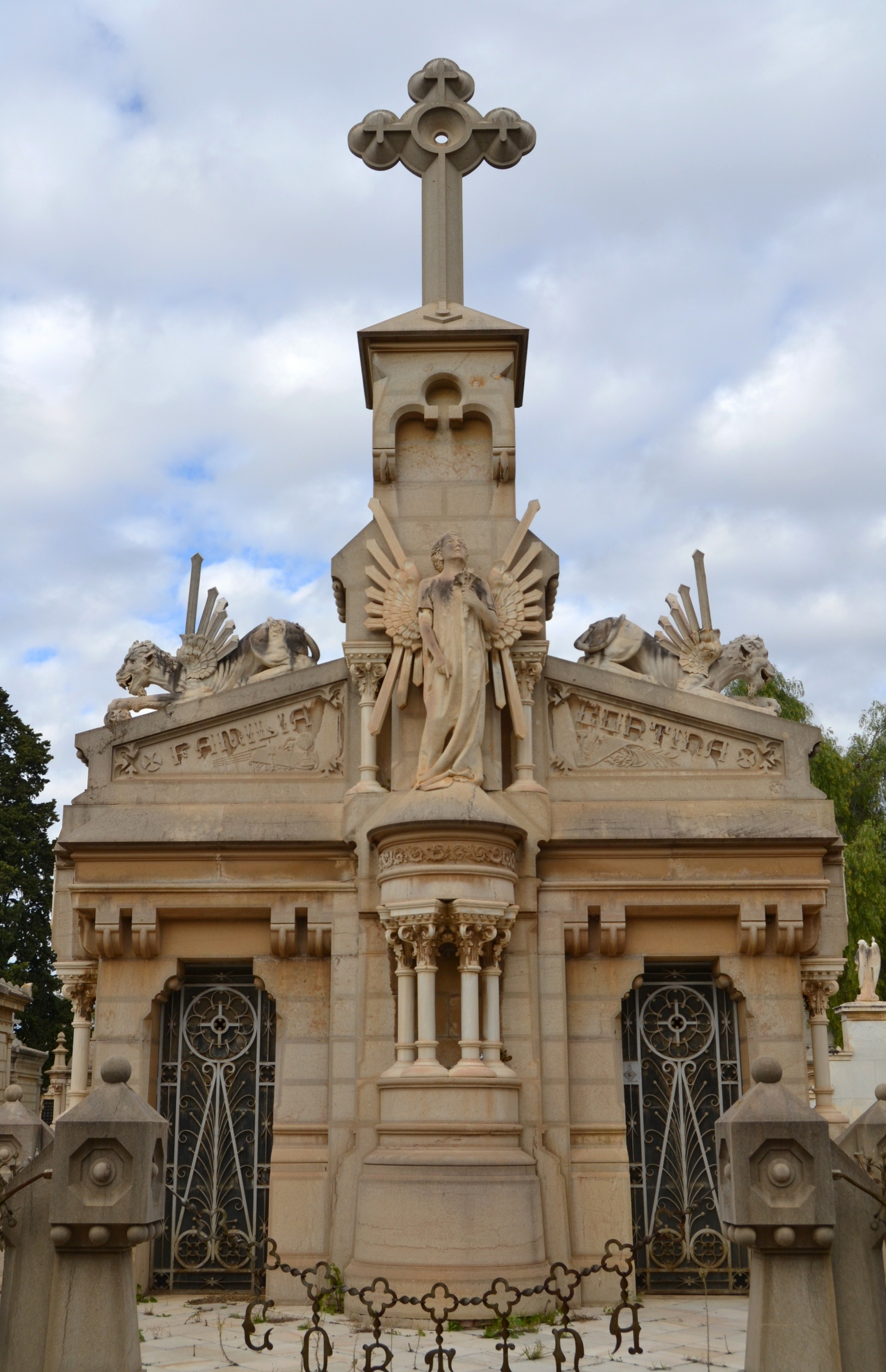 Panteó de la família Cortina, cementeri general de València.